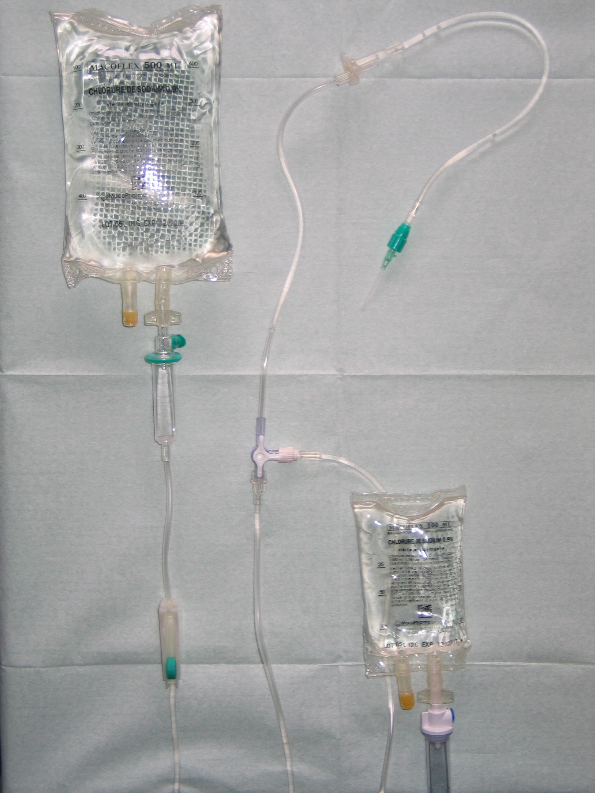 Ligne de perfusion